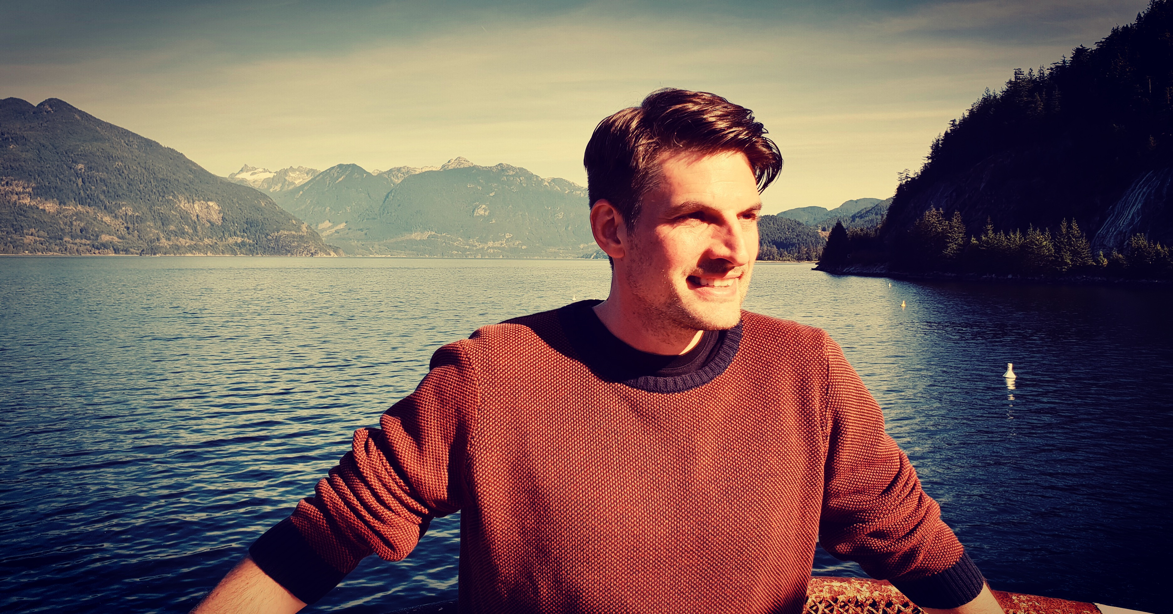 Christoph Gérard Stein